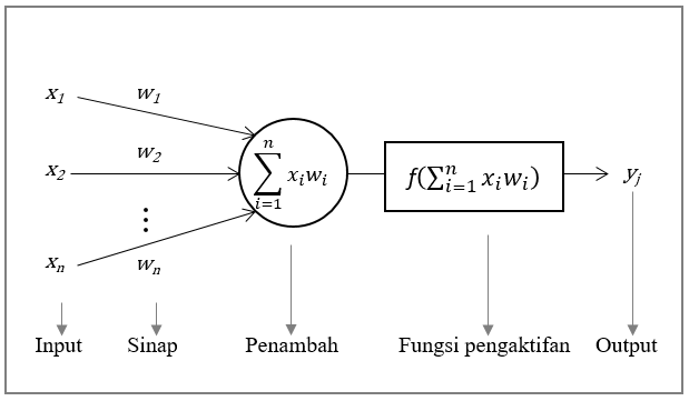 Gambar rajah blok bagi Rangkaian Neural Buatan